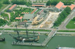 Luchtfoto van de Bataviawerf, mei 2004. Foto Dean van der Zanden.